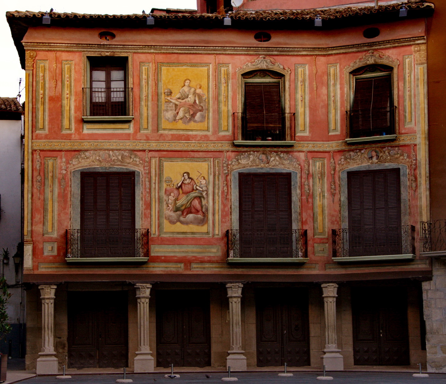 Casa Barón a la plaça Major de Graus (Osca-Espanya)